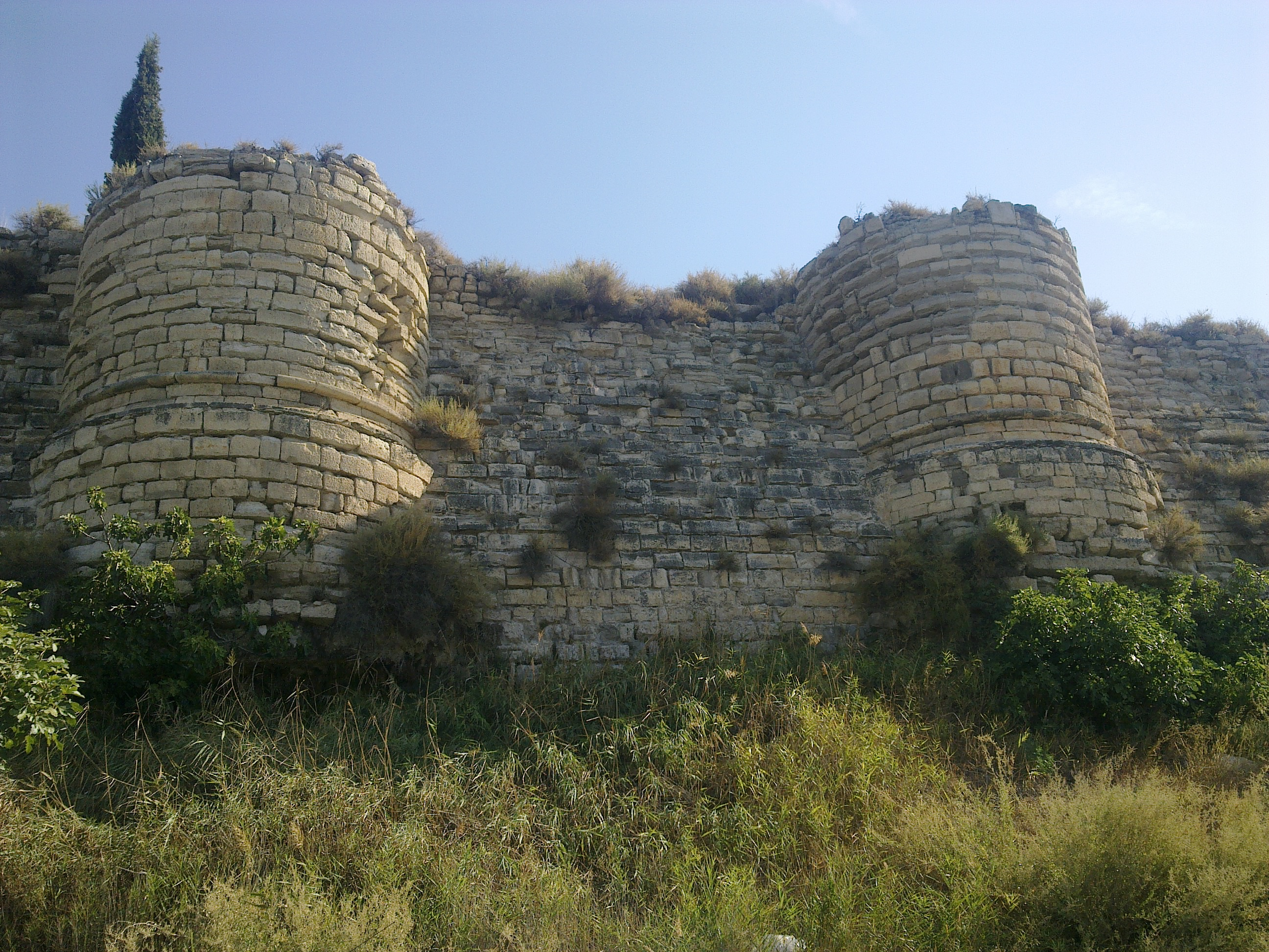 Data de construcció desconeguda